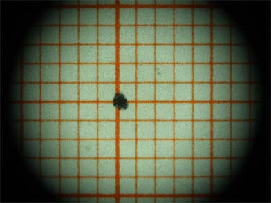 Vignettierung (Randabschattung) bei einer Aufnahme mit einem Mikroskop durch das Okular. Dieses Foto mit einer Kompaktkamera „Freihand“ über dem Mikroskopokular erstellt. Durch mangelnde optische Anpassung kann der Rand des Kamera Sensor nicht belichtet werden.